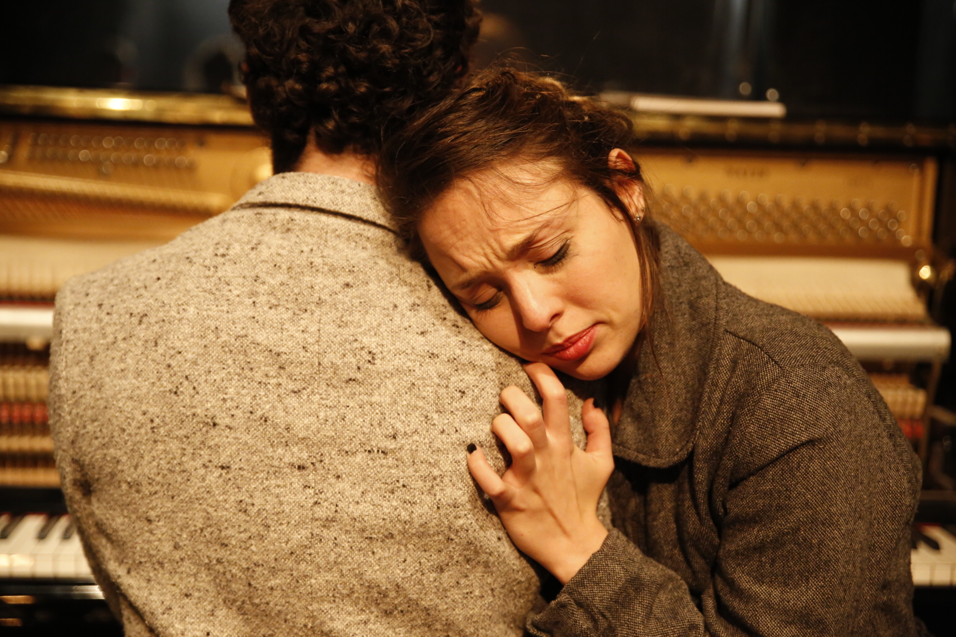 ההצגה השחף